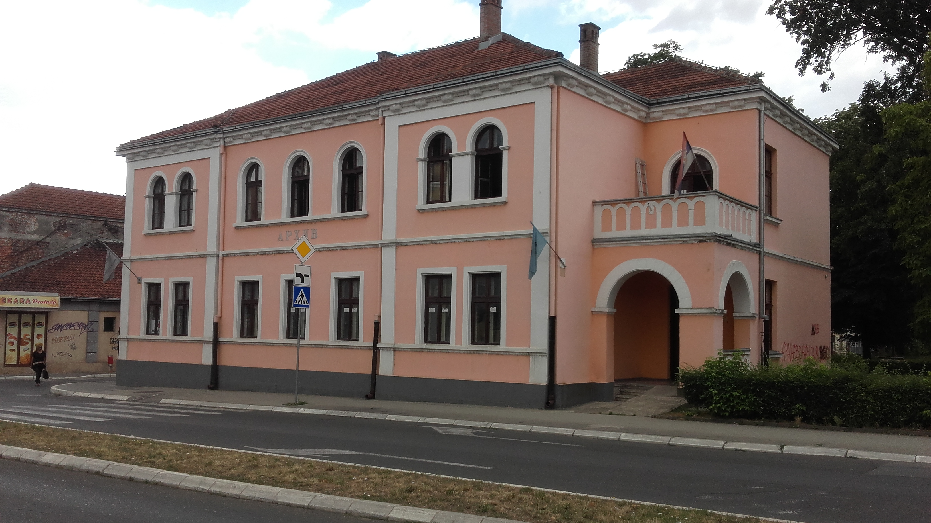 Arhiv u Kraljevu